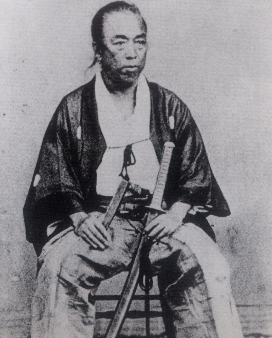 安岡良亮(1825-1876) 土佐出身の郷士。熊本県令。神風連の乱の際に死亡した。